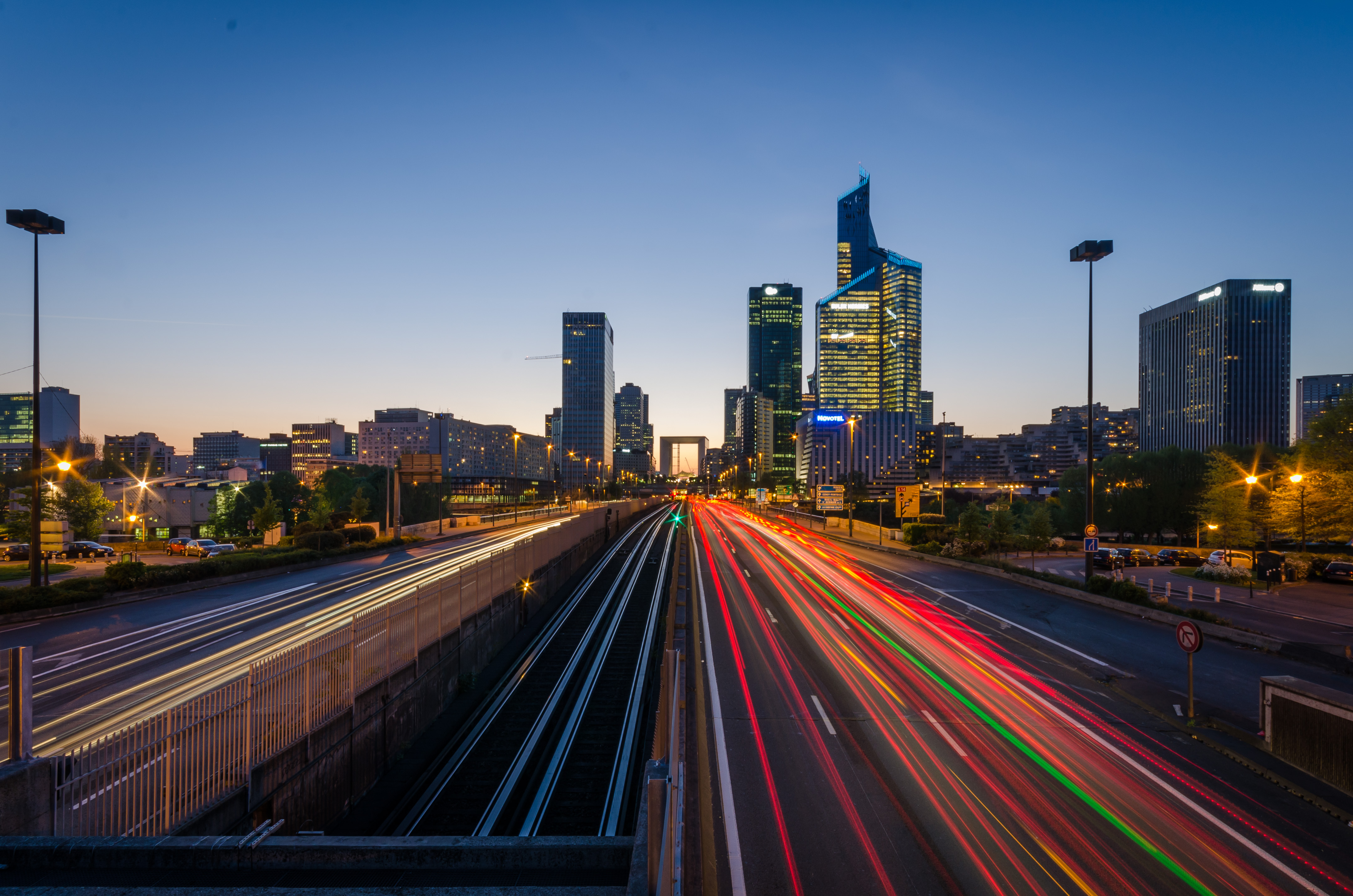 Twilight in La Défense, Paris.